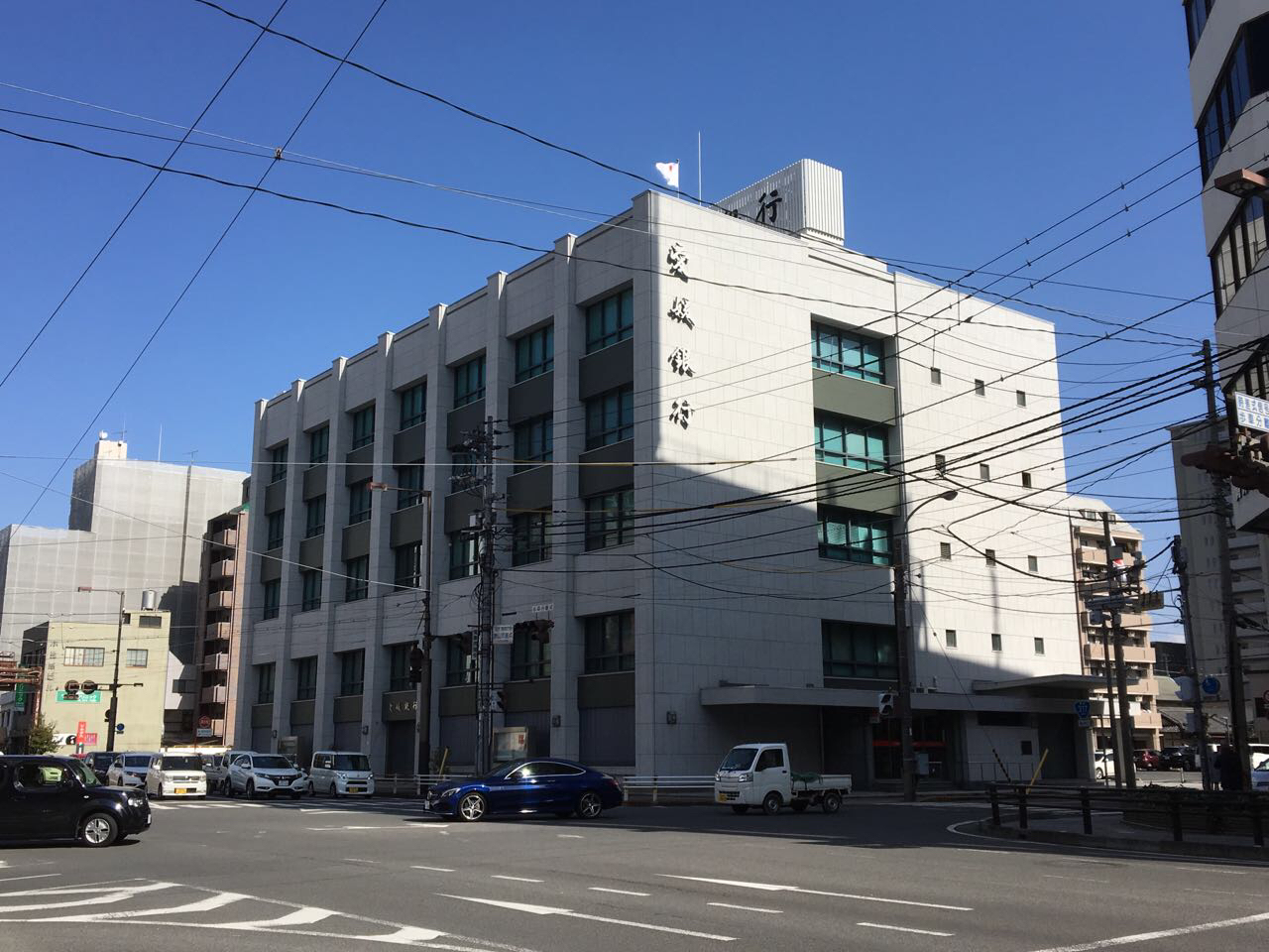 愛媛銀行本店（愛媛県松山市）